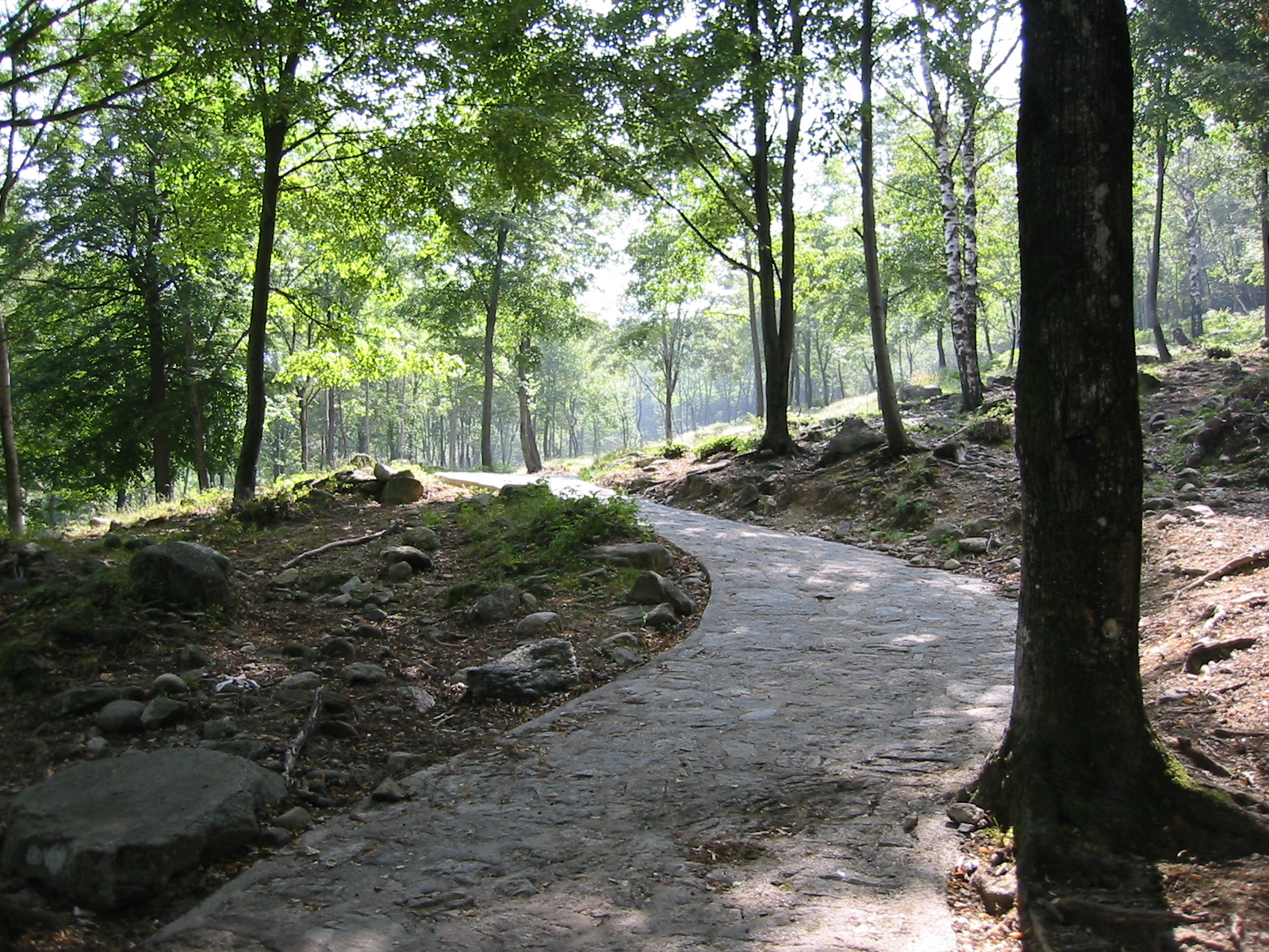 Enco - la strada di pietre